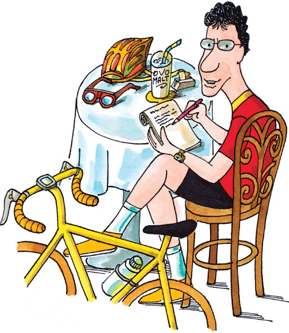 Nicola Pfund during his travels by bicycle in Switzerland